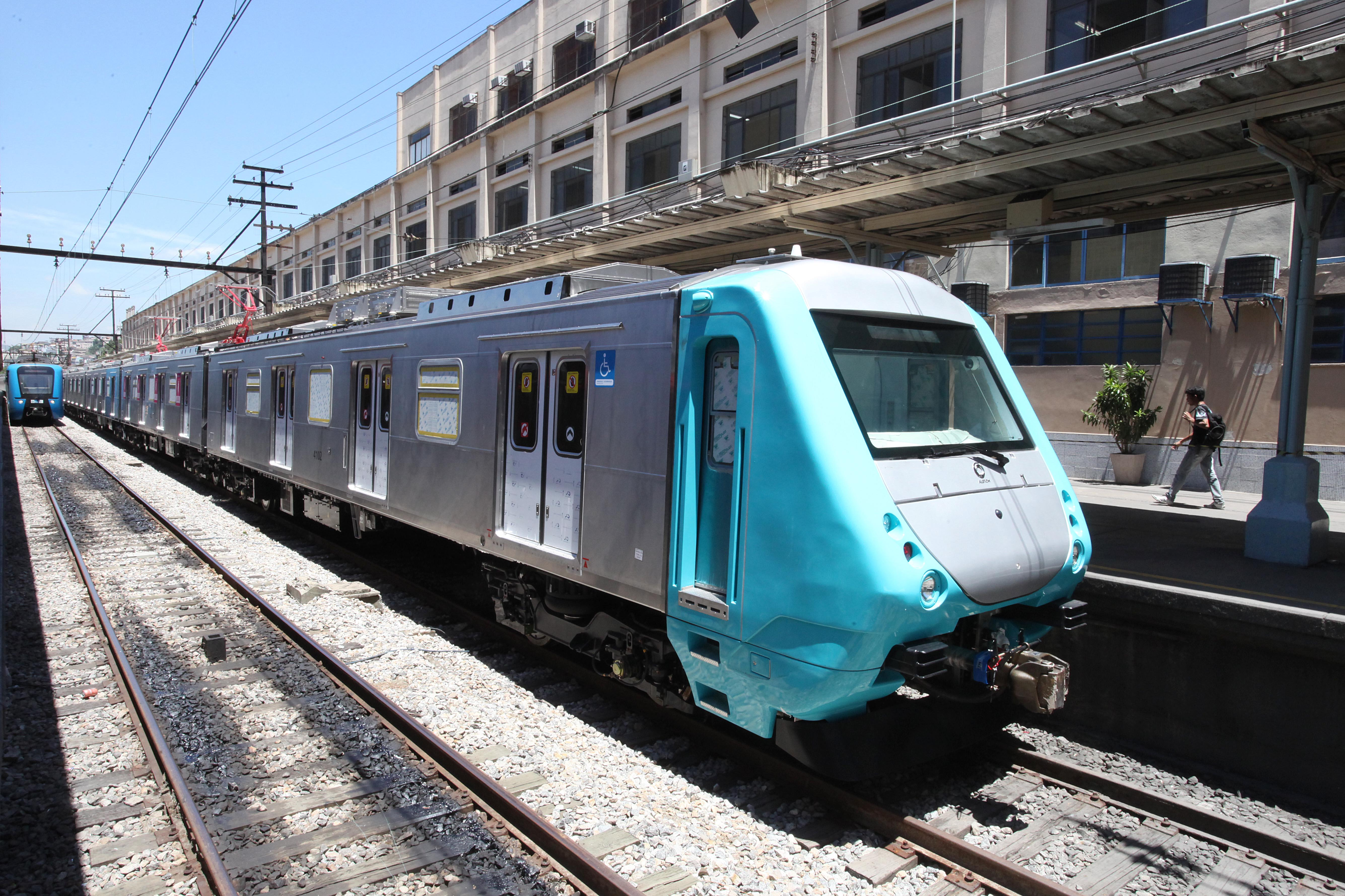 Novo trem da SuperVia, estacionado na plataforma 13 para apresentação a imprensa.